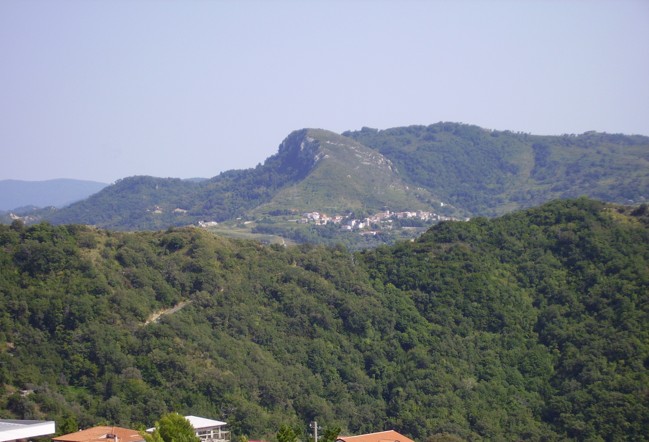 San Pietro in Amantea visto da Belmonte Calabro